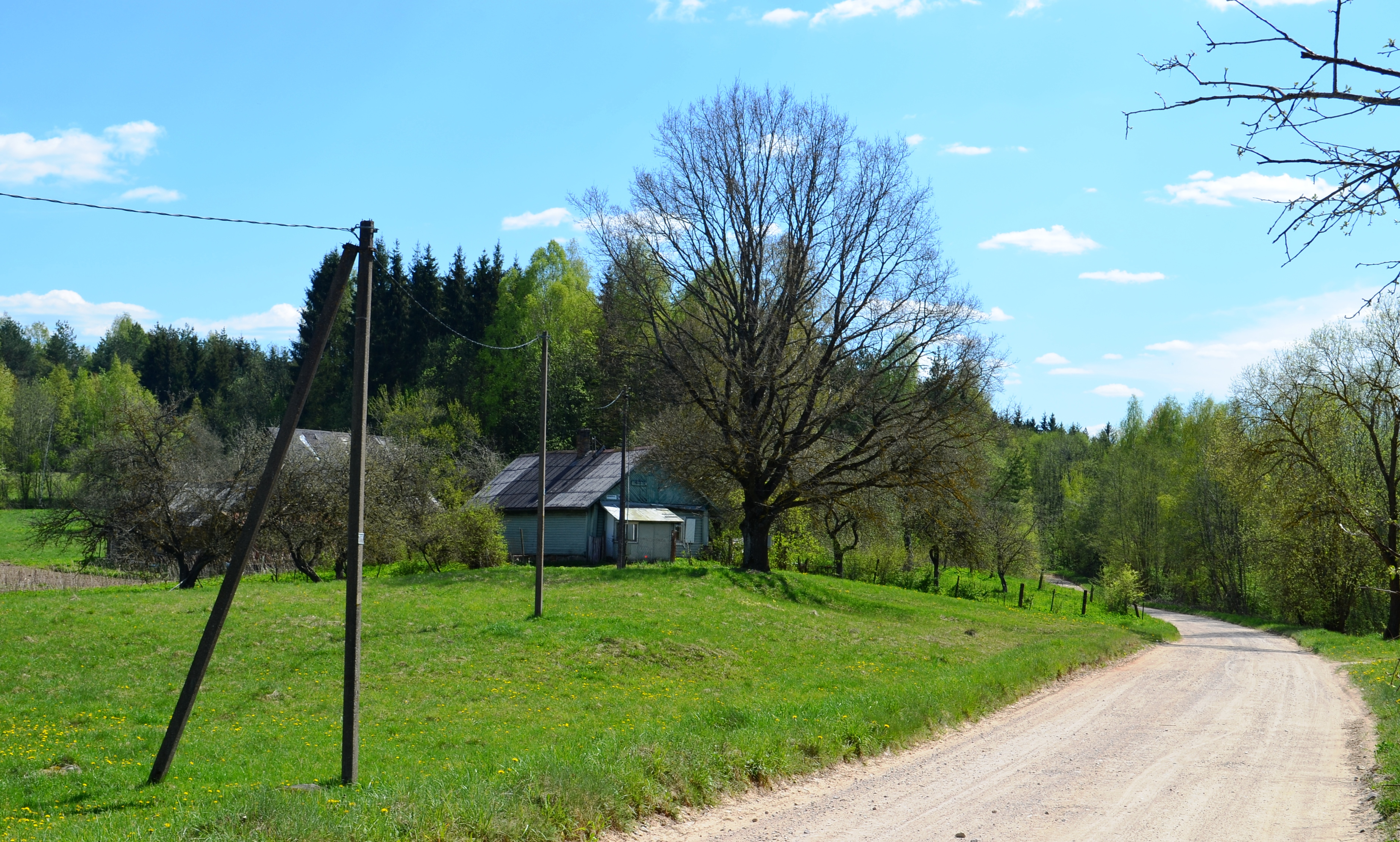 Senas sodžius Jadvygiškėse, Riešės sen., Vilniaus raj.